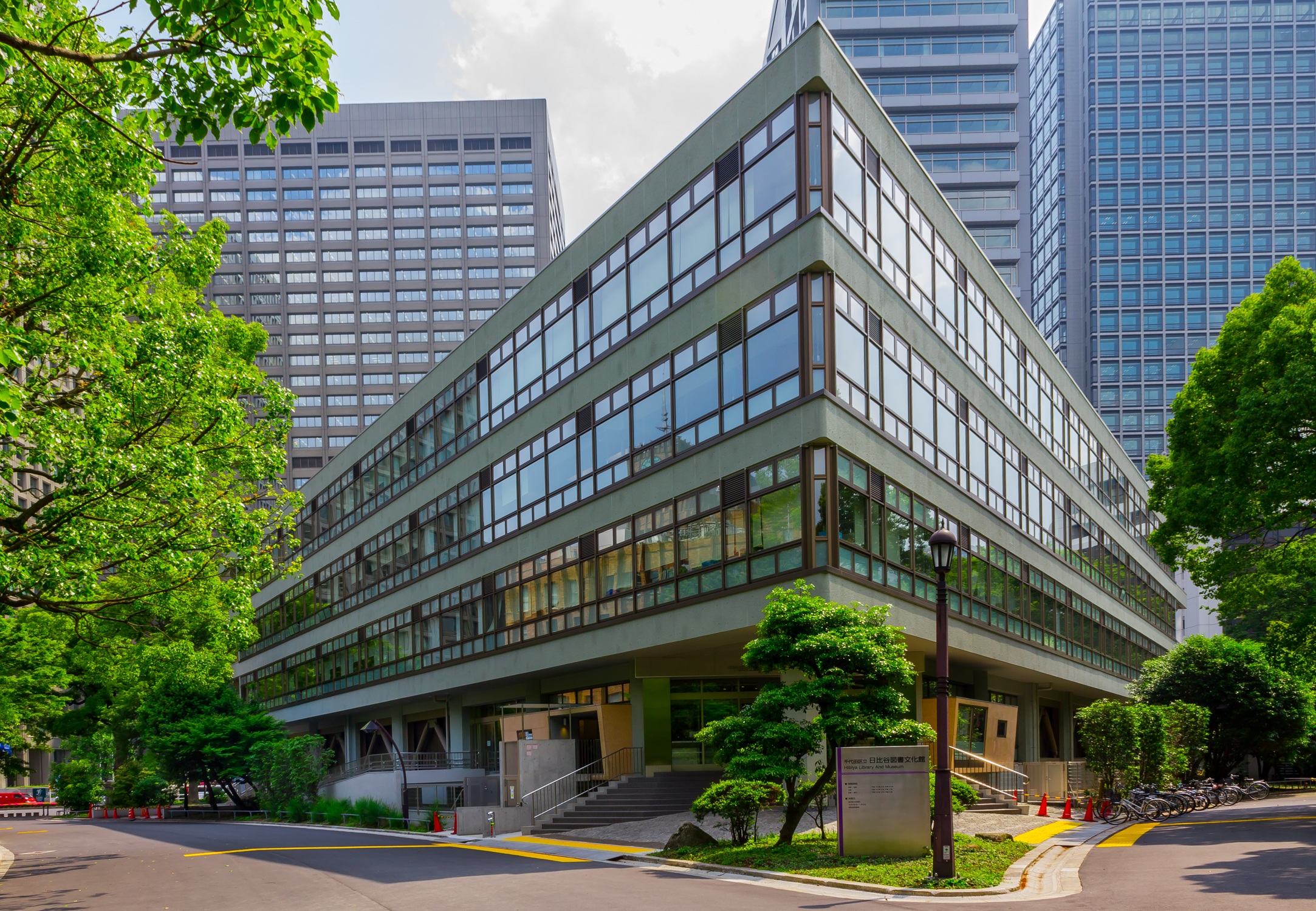 日比谷図書文化館（元日比谷図書館）